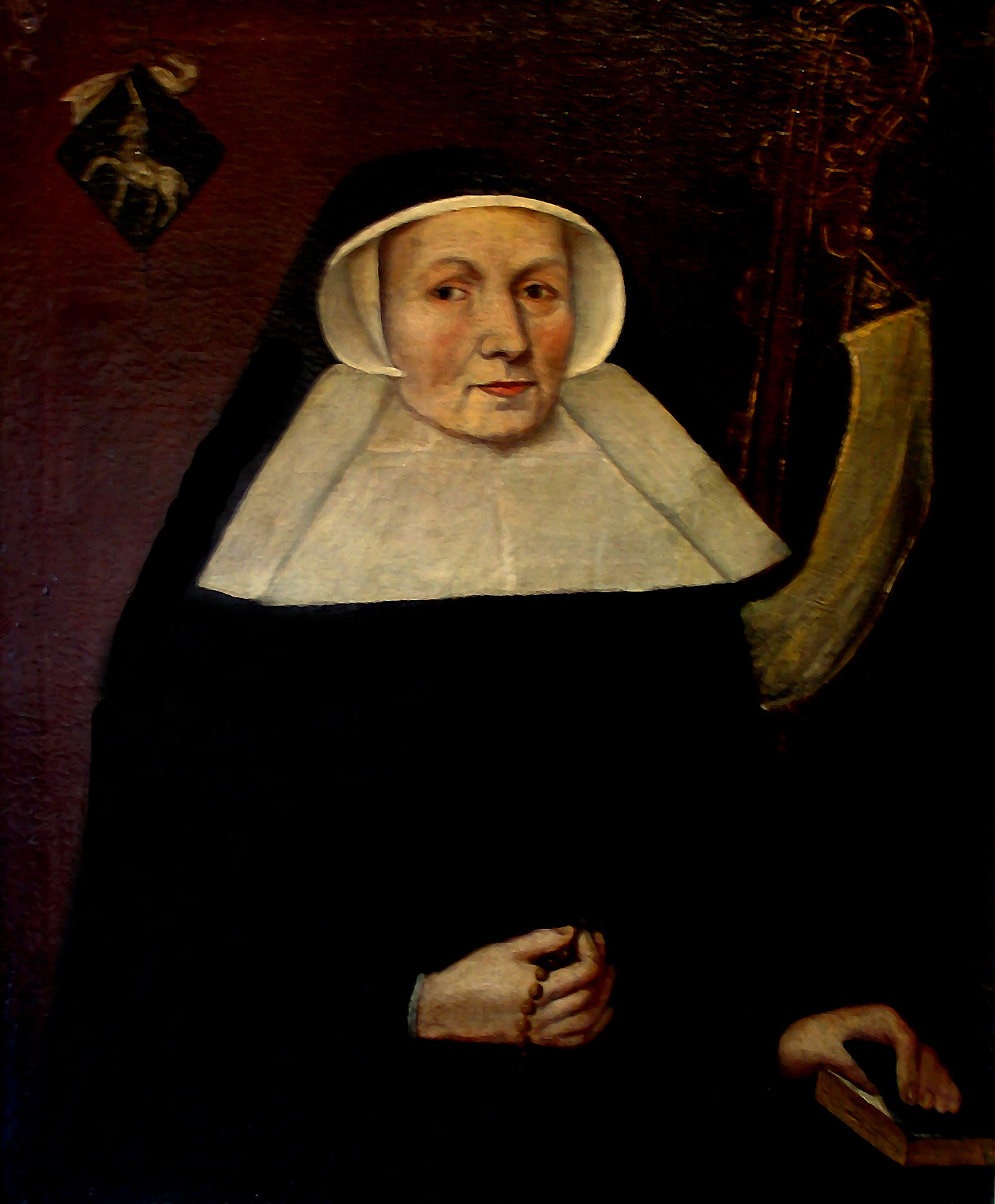 anoniem schilderij van abdis Beatrix van Reckhoven in het Stadsmus (museum) te Hasselt